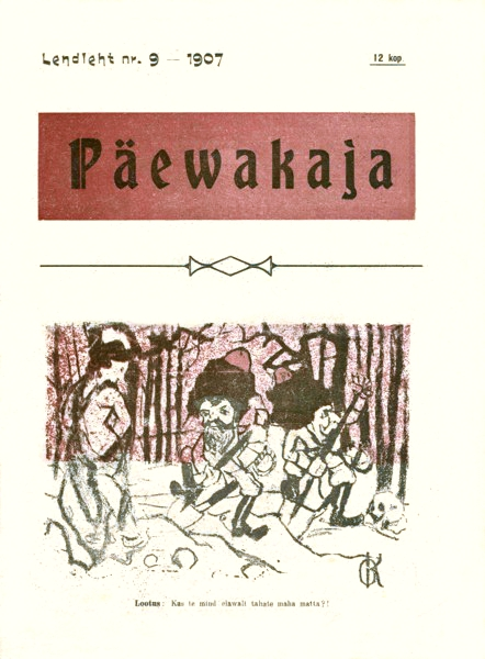 Lendleht nr 9, Päewakaja, esikaas